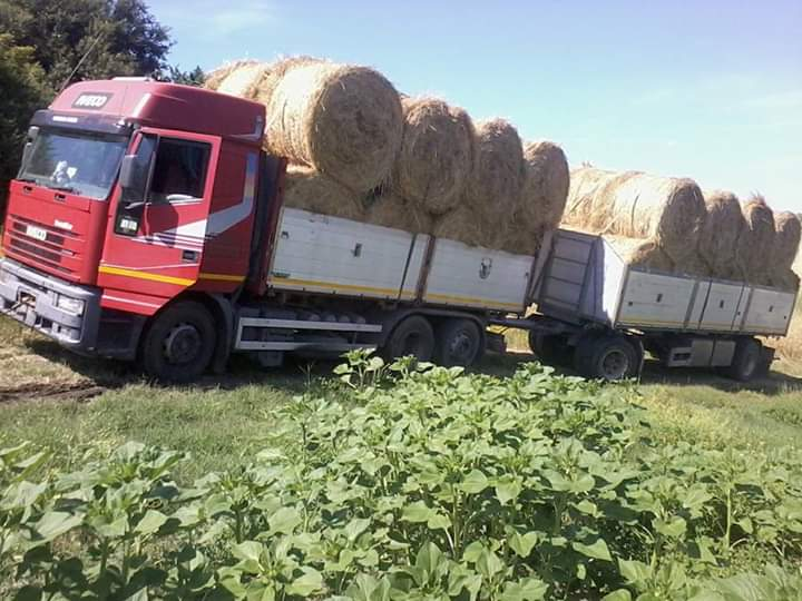 Camion italiano